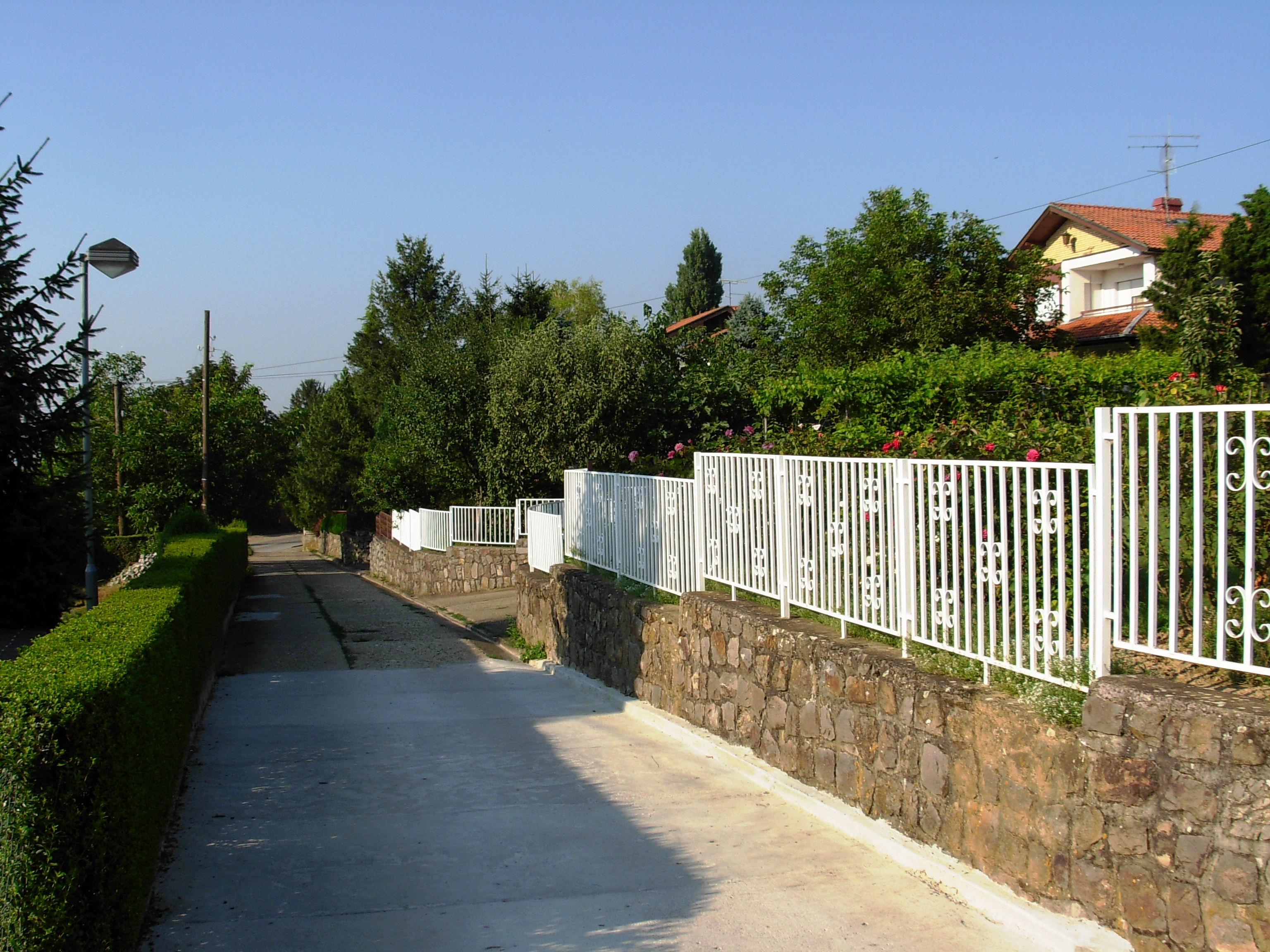 Ulica na Čardaku, Sremska Kamenica.